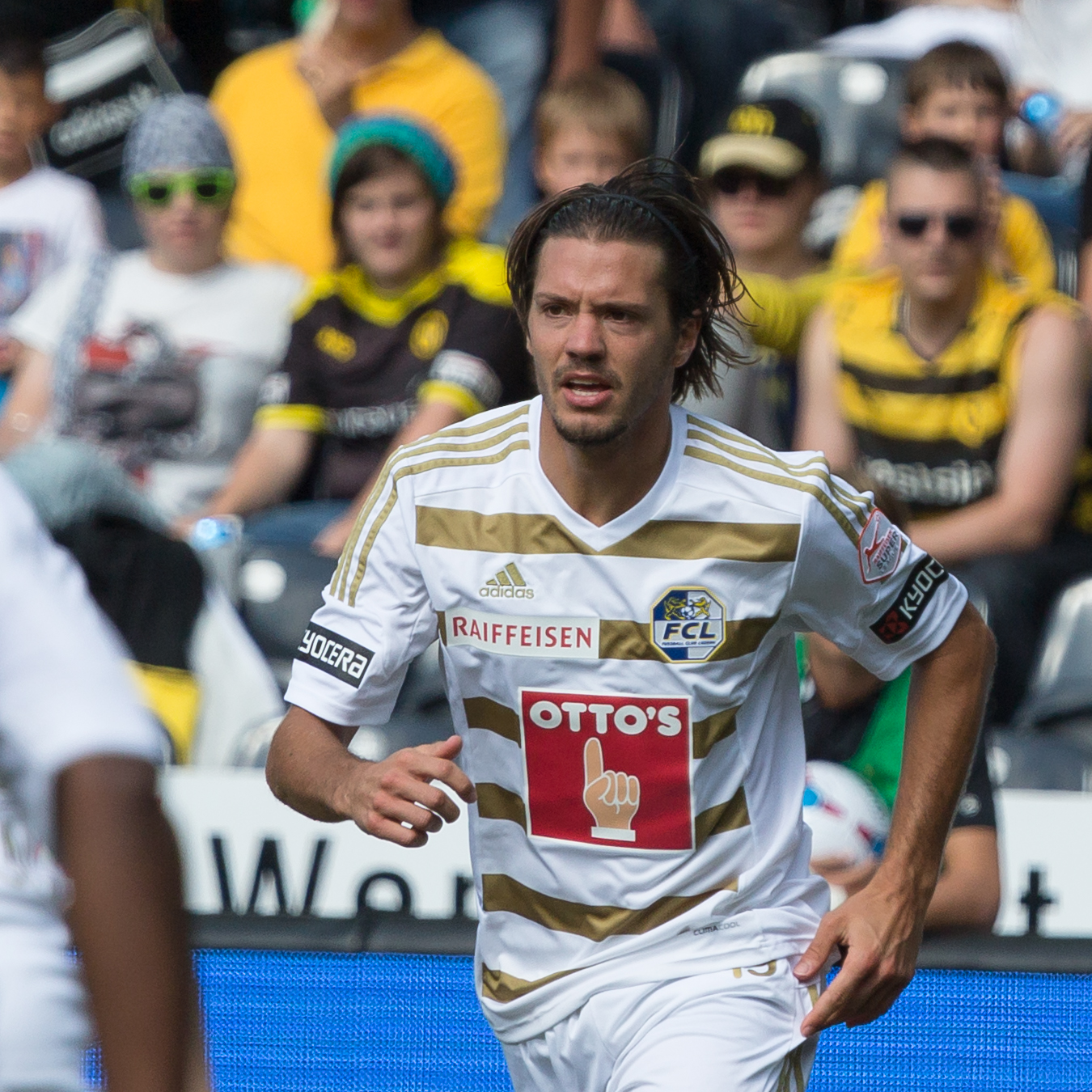 Adrian Winter beim Spiel des BSC Young Boys gegen den FC Luzern